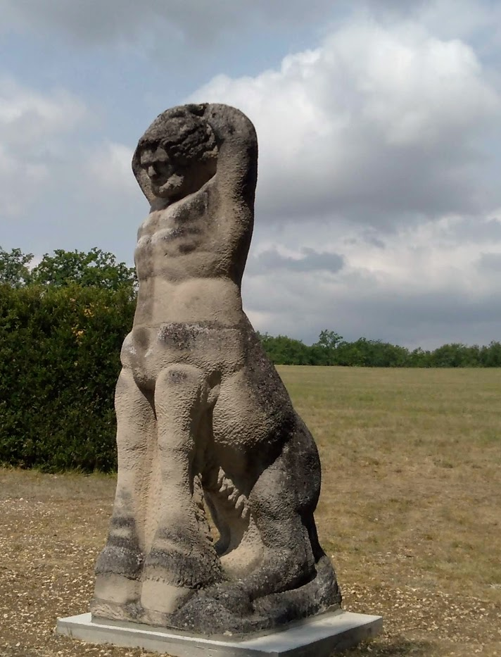 La statue "Le Centaure" d'André Abbal, installée en juillet 2019 dans le parc du château-musée du Cayla, maison natale du poète Maurice de Guérin.